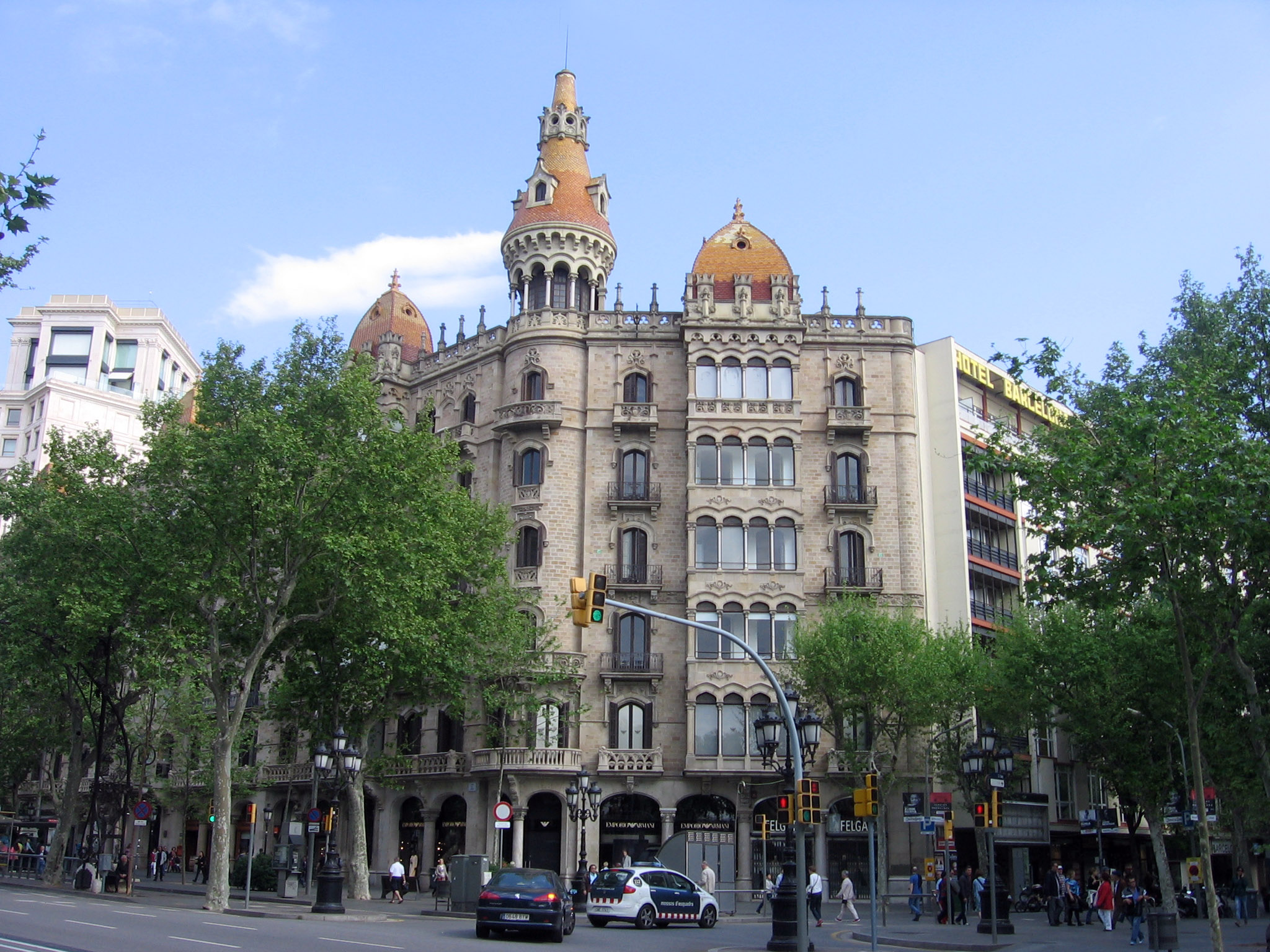 Casas Rocamora.